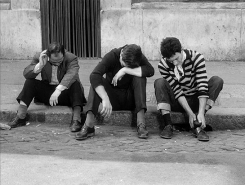 Accattone